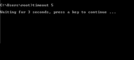 timeout Command - cmd